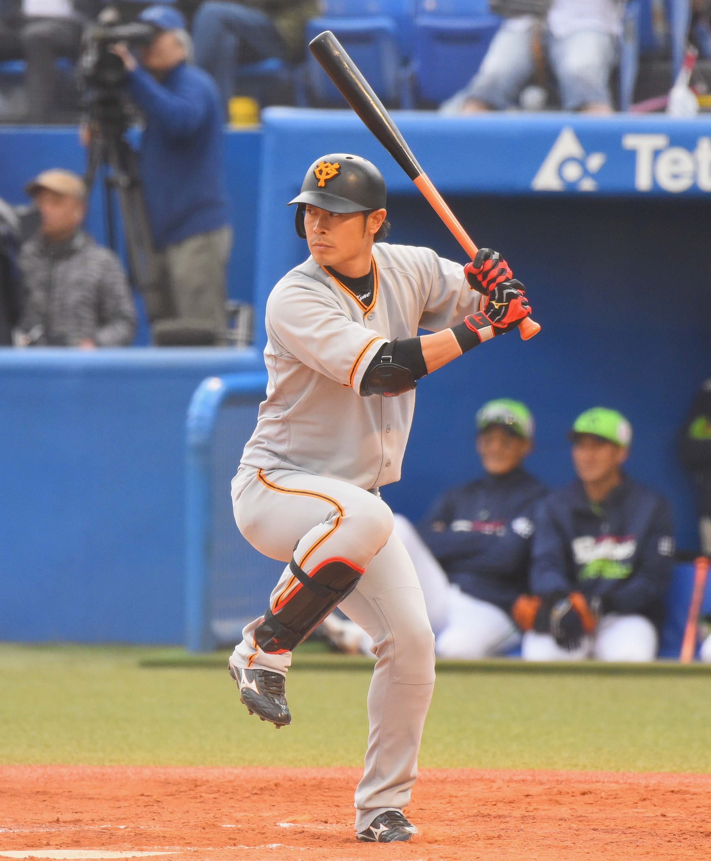 読売巨人軍 亀井義行 2018年4月7日 神宮球場